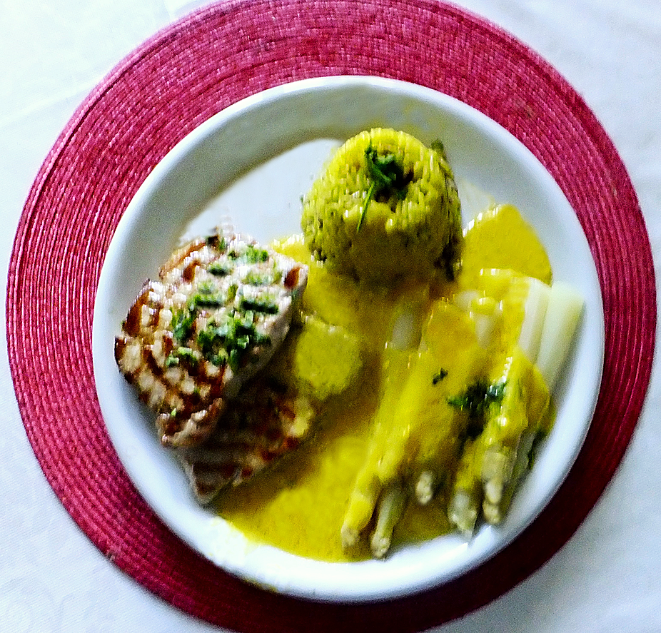 Friptură de porc, sparanghel, orez cu ceapă, ciuperci și safran, sos olandez